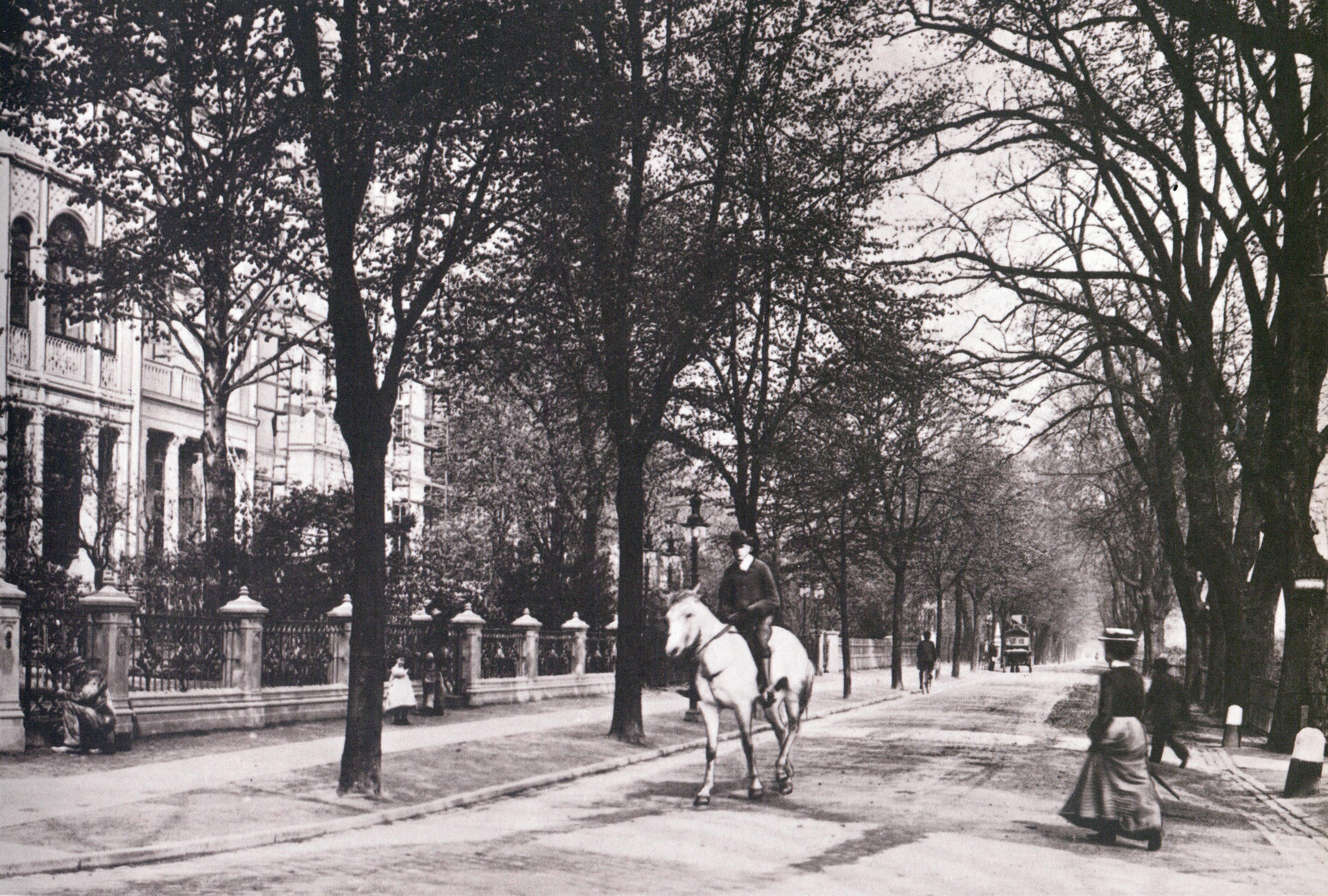 Hamburg 1904; Harvestehuder Weg an der Ecke Alte Rabenstraße